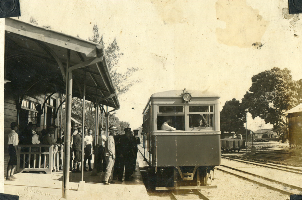 日治時期的旗山驛後驛，列車準備往旗尾與美濃竹頭角方向前進，此線兼營客運因此可見乘客上車